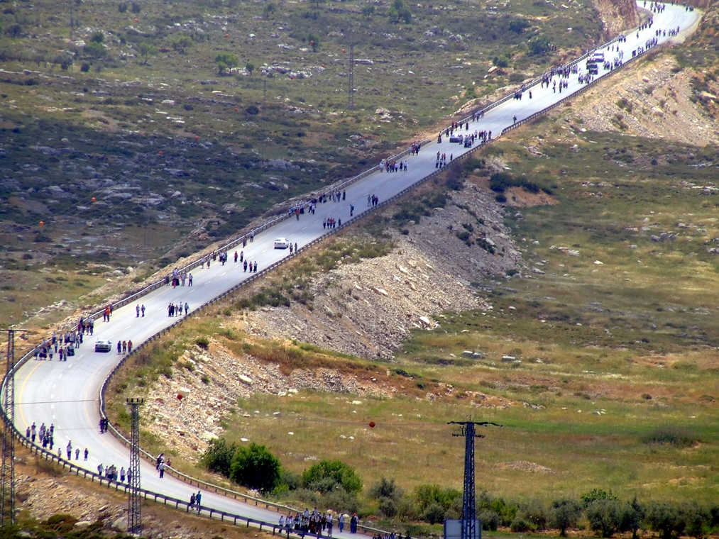 עלייה לחומש ביום העצמאות תשס"ז